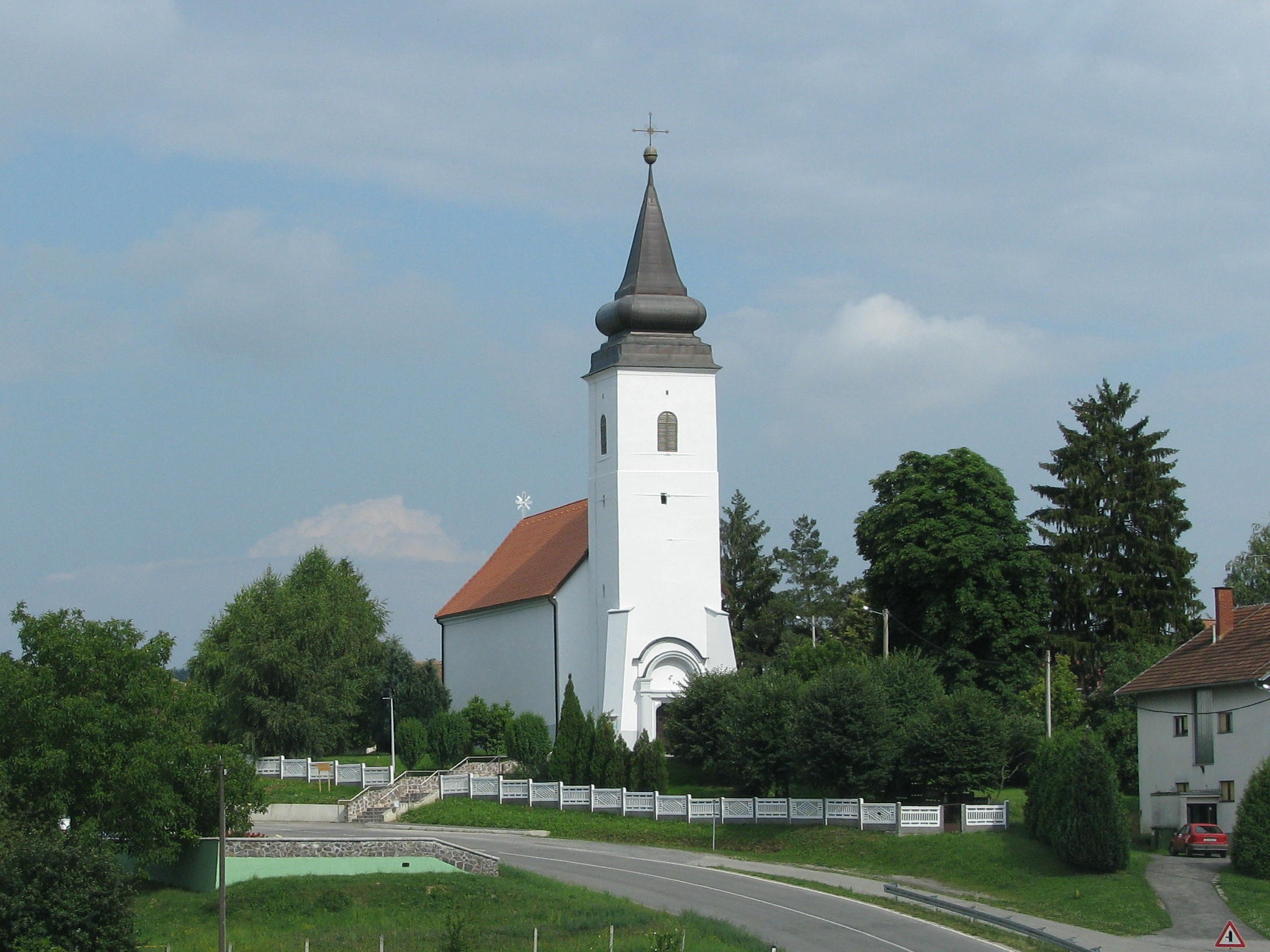 Crkva u Bisagu, Općina Breznica, Varaždinska županija